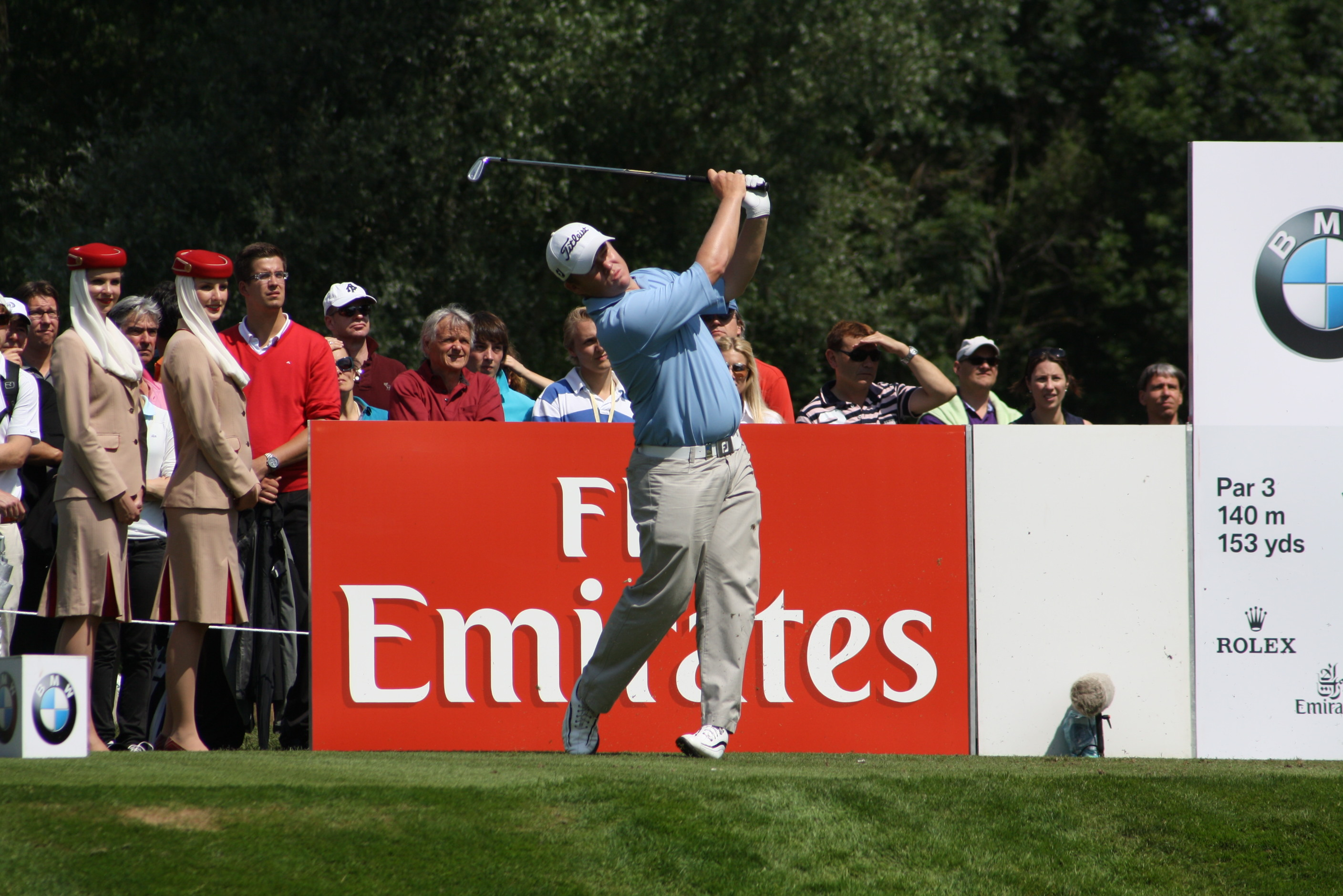 23. BMW International Open bei Muenchen Golfer George Coetzee